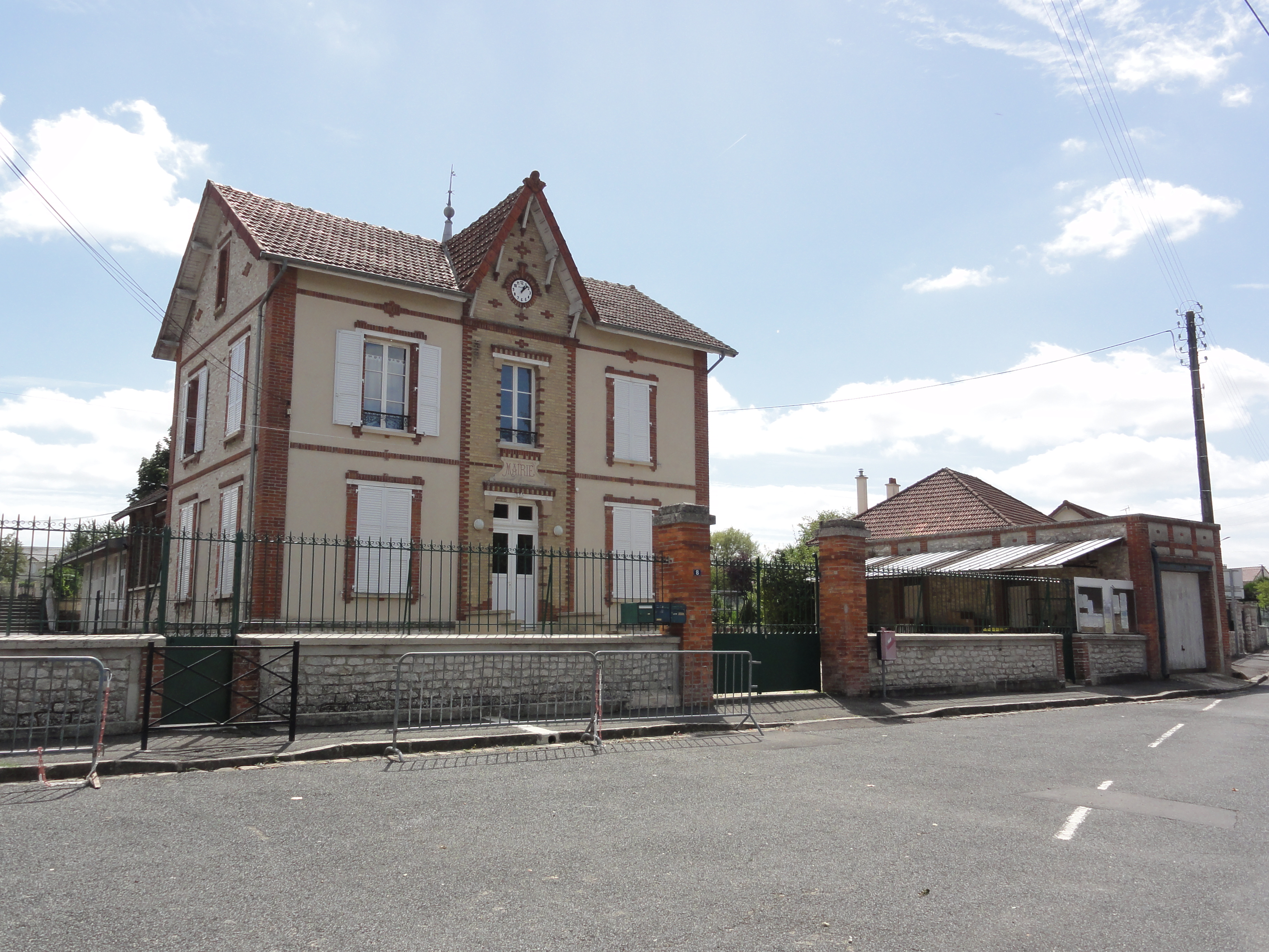 Rouilly (Seine-et-Marne) La mairie à La Bretonnière